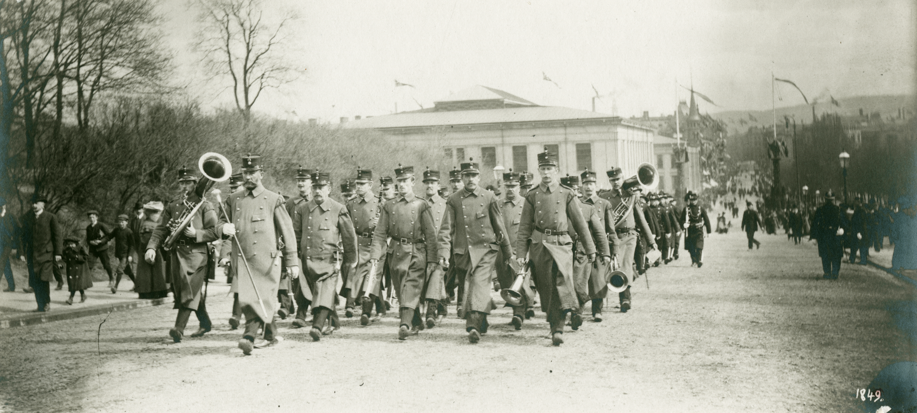 Slottet i Oslo, Oslo Parti fra Slotsparken.Forsvarets annen brigades musikkorps Ved Hærordningen av 1817, som ble satt i verk 1. januar 1818, ble det blant annet bestemt at no:2. Agersusiske Brigade skulle ha et musikkorps, og navnet ble 2. Brigades musikkorps. I 1918 ble brigadene omdøpt til divisjoner, og følgelig ble korpsets navn endret til 2. Divisjons Musikkorps, et navn som korpset hadde frem til 1953, hvor inndelingen i divisjoner ble forlatt og korpset omdøpt til Forsvarets Stabsmusikkorps.«Korps tilknyttet Hæren ble først kalt Brigademusikken, senere Divisjonsmusikken; ved inndelingen i brigader 1817 fikk hver infanteribrigade 19 musikere, 23 fra 1880» ifølge snl.no